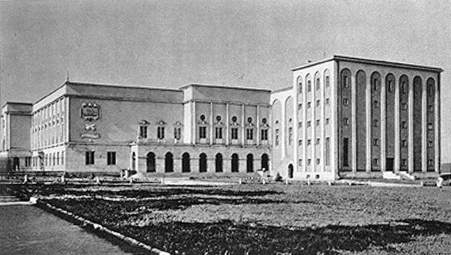 Дім фізичного виховання у Кельцах. Архітектор Едгар Норверт (1884—1950).